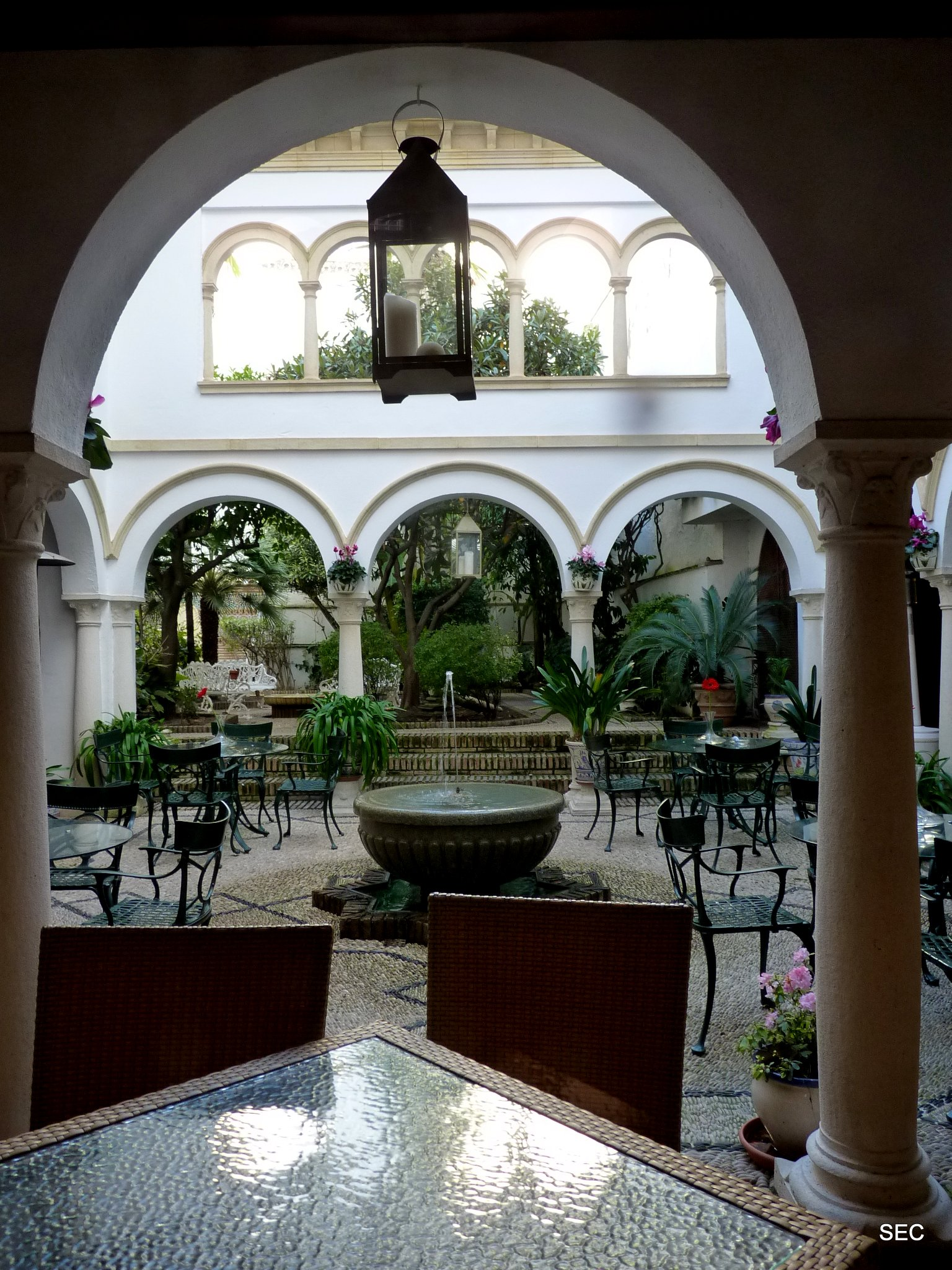 ´Patíos cordobeses